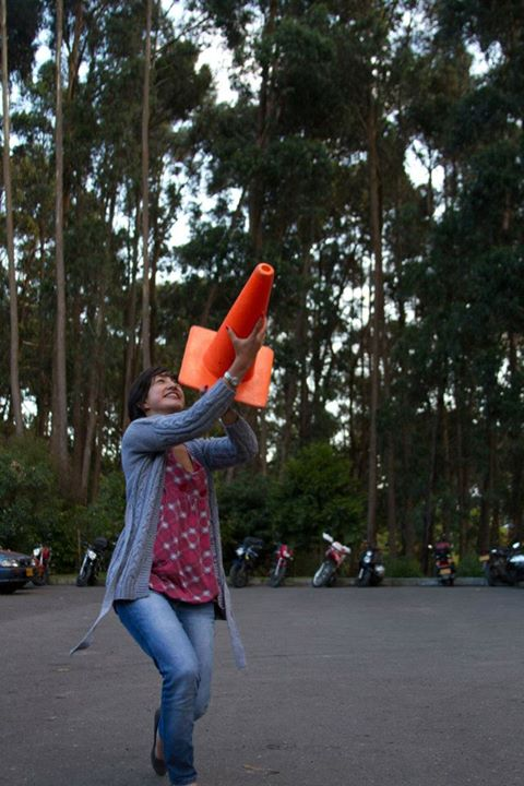 Neosolteros.